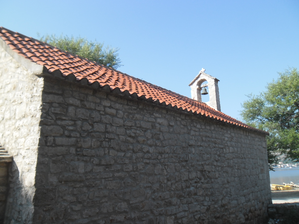 grad Vis